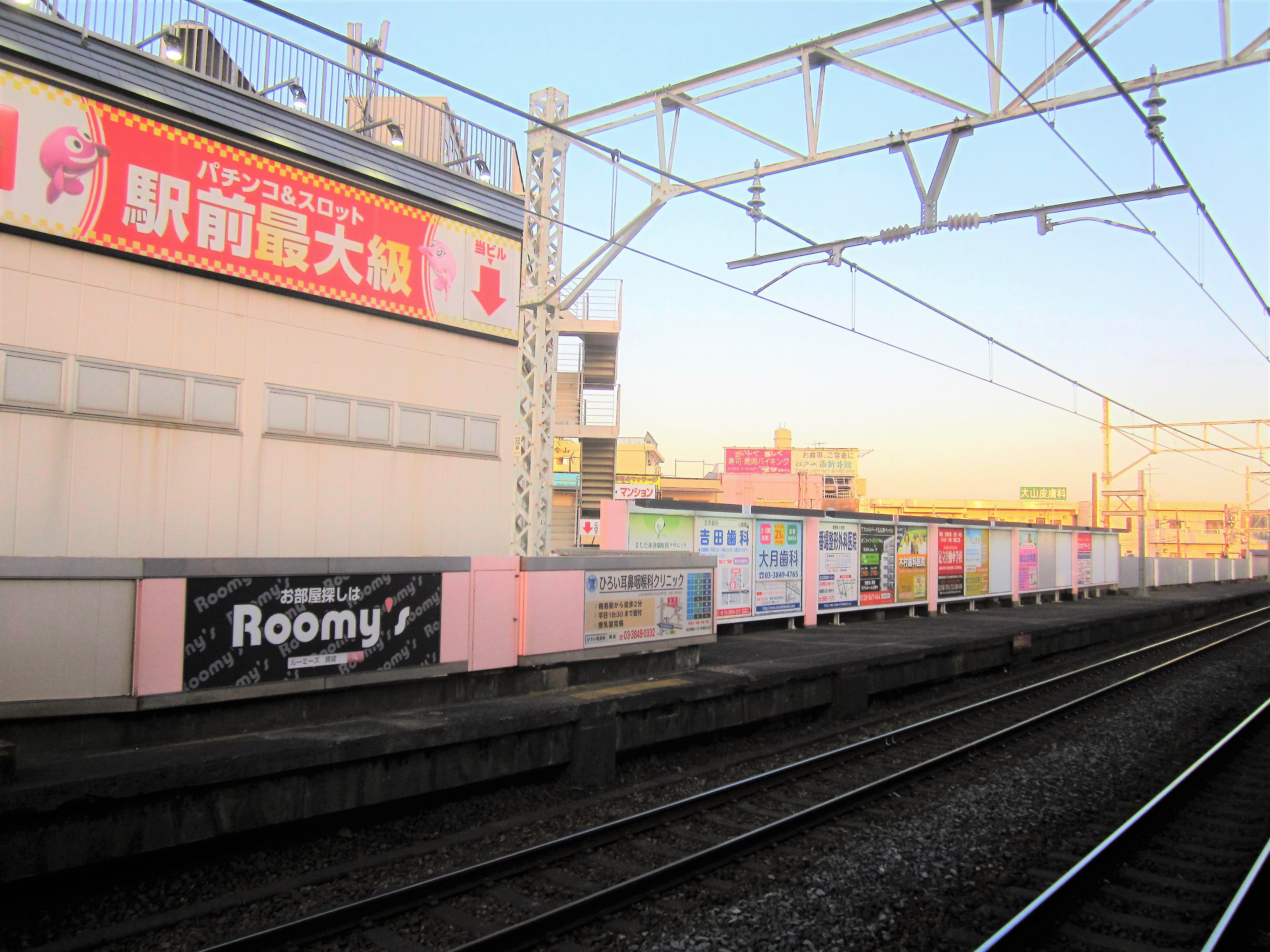 五反野駅の旧上りホーム